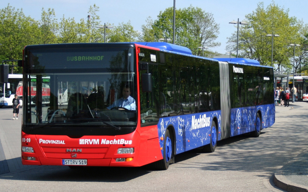 RVM NachtBus